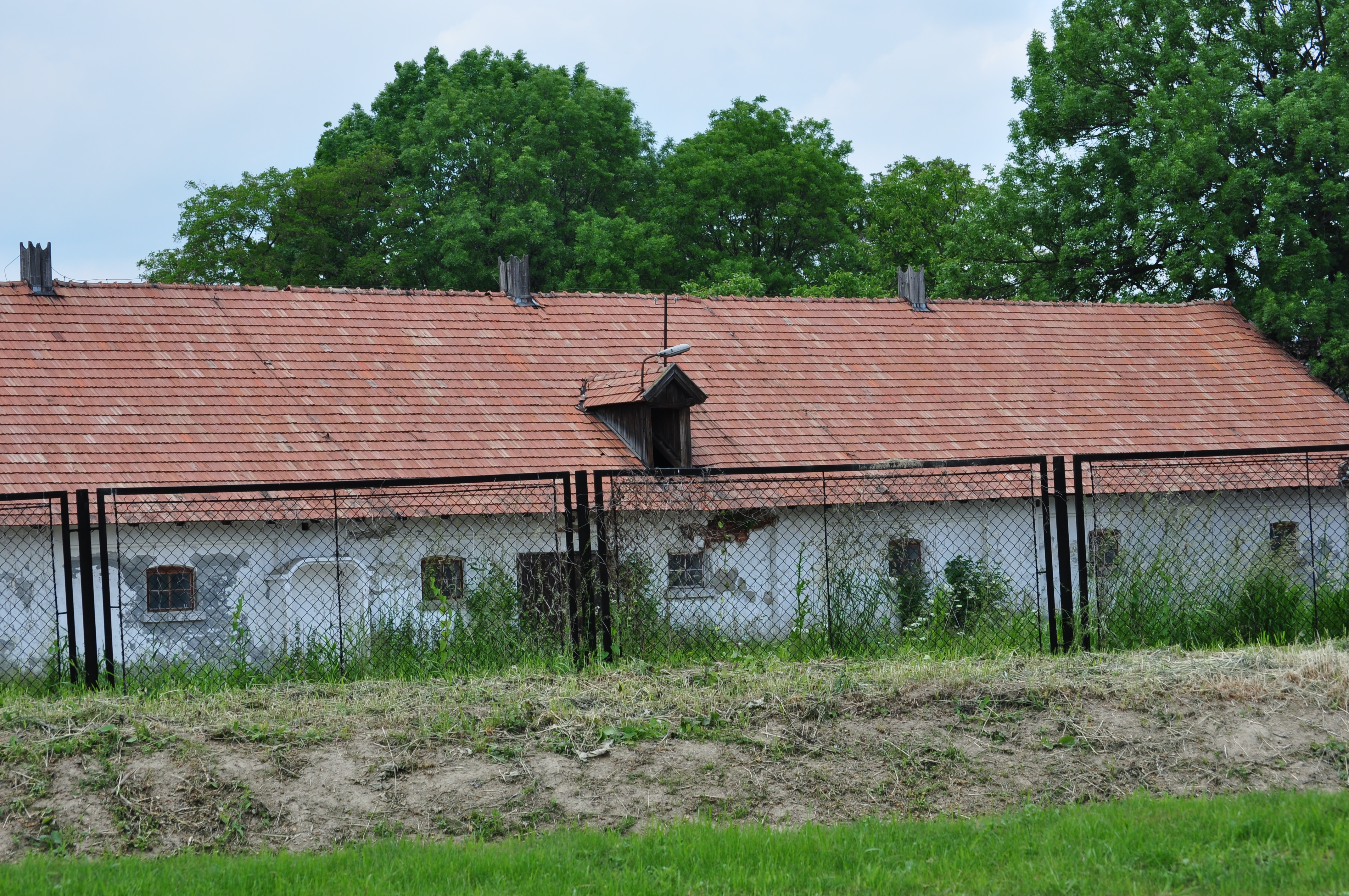 Radlna (powiat tarnowski) jeden z budynków folwarcznych. Na pierwszym planie obwałowanie potoku Radlanka. Fot.2012